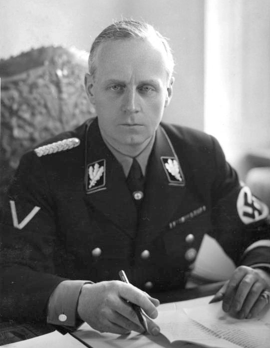 Joachim von Ribbentrop Reichsaussenminister v. Ribbentrop. 19.7.40. [Herausgabedatum] AV. 59951 [Berlin.- Joachim von Ribbentrop. (Porträt) Aufgenommen im April 1938 in Vorbereitung zum 45. Geburtstag am 30.4.1938 auf Gut Sonnenburg bei Freienwalde.] Abgebildete Personen: Ribbentrop, Joachim von: Außenminister, NSDAP, Deutschland